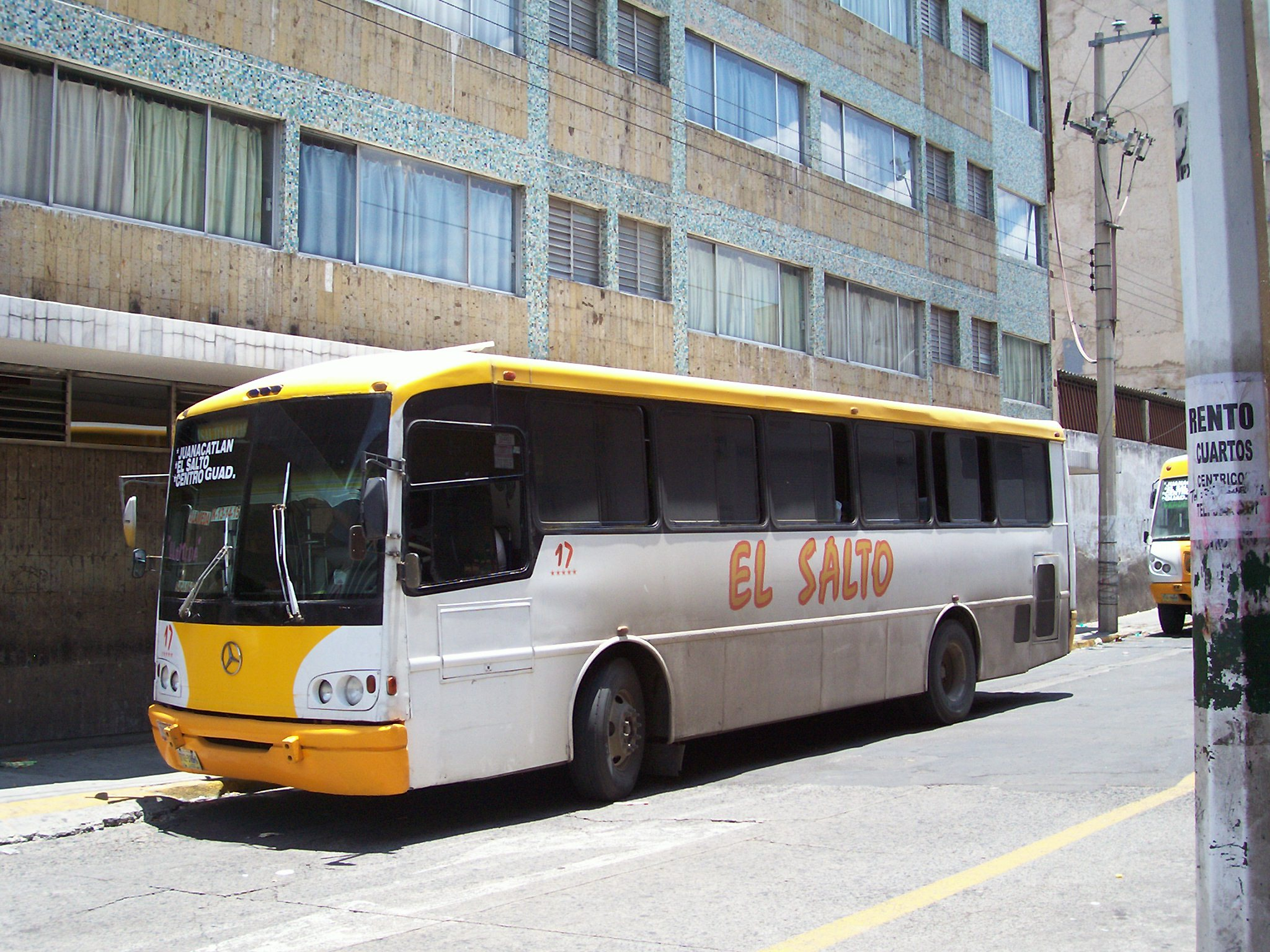 Autobus de la linea Suburbana El Salto